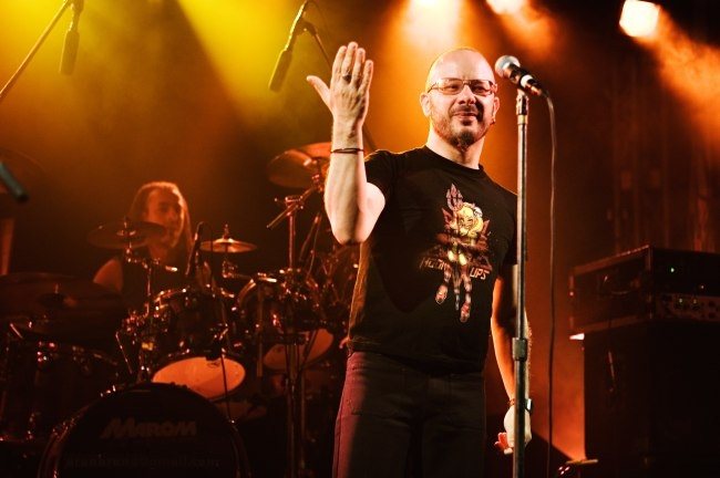 Kobi oz. donated by photographer קובי אוז בהופעה חיה. צילום מאת אהרן ברנד. הצילום נתרם ע"י הצלם.